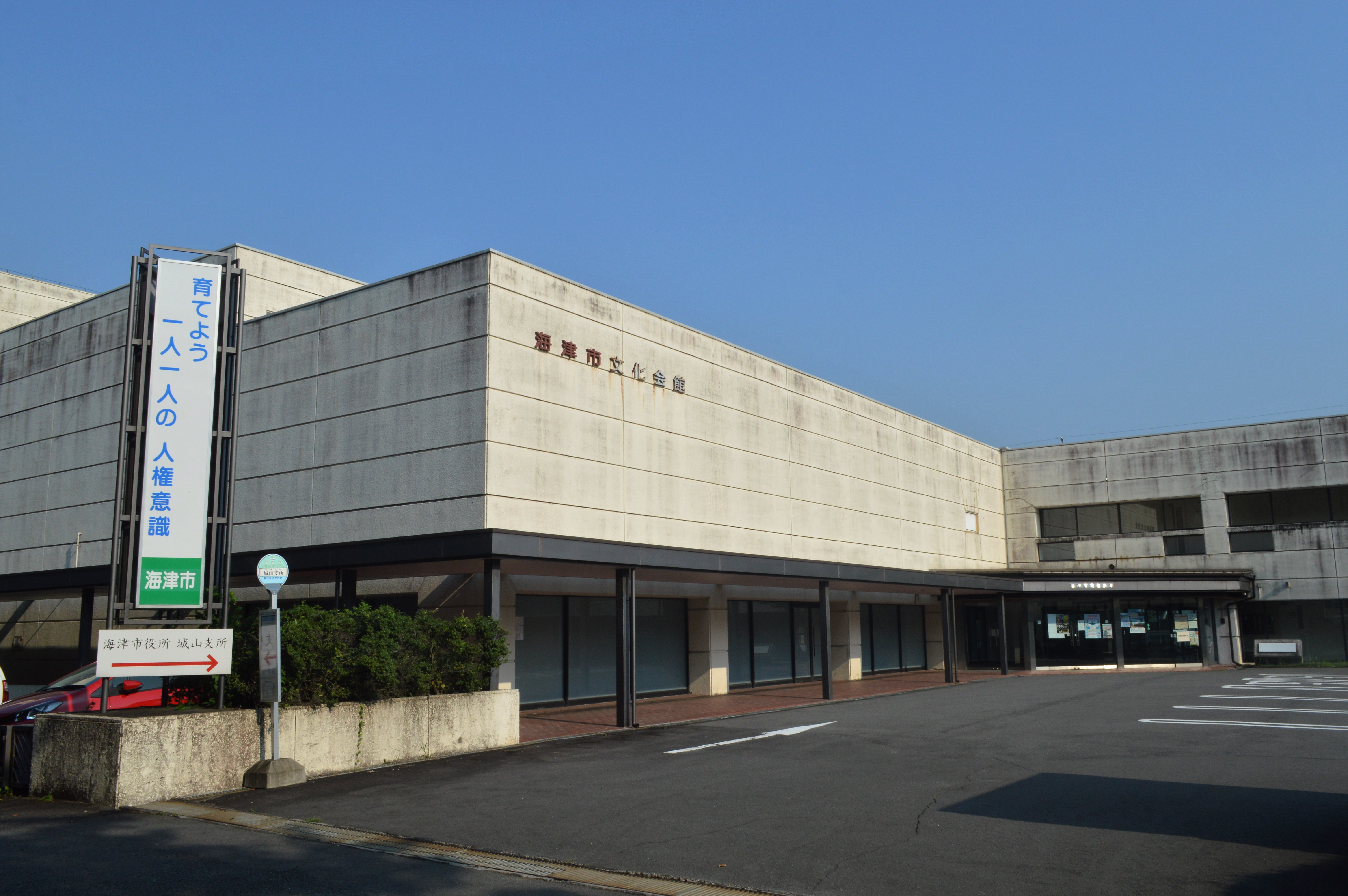 岐阜県海津市にある海津市文化会館。